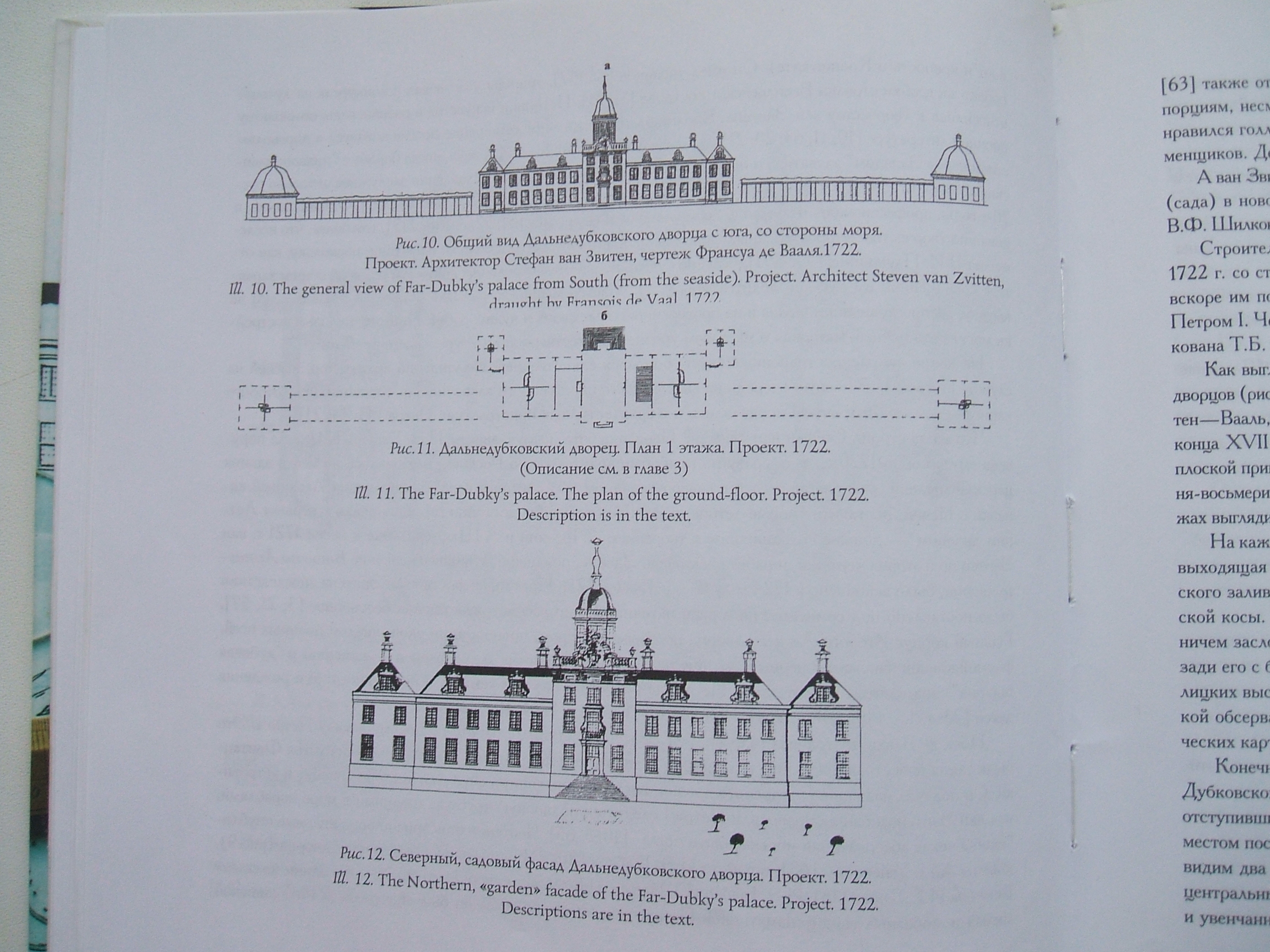 Фото Проекта дворца Петра I в Сестрорецких Дубках